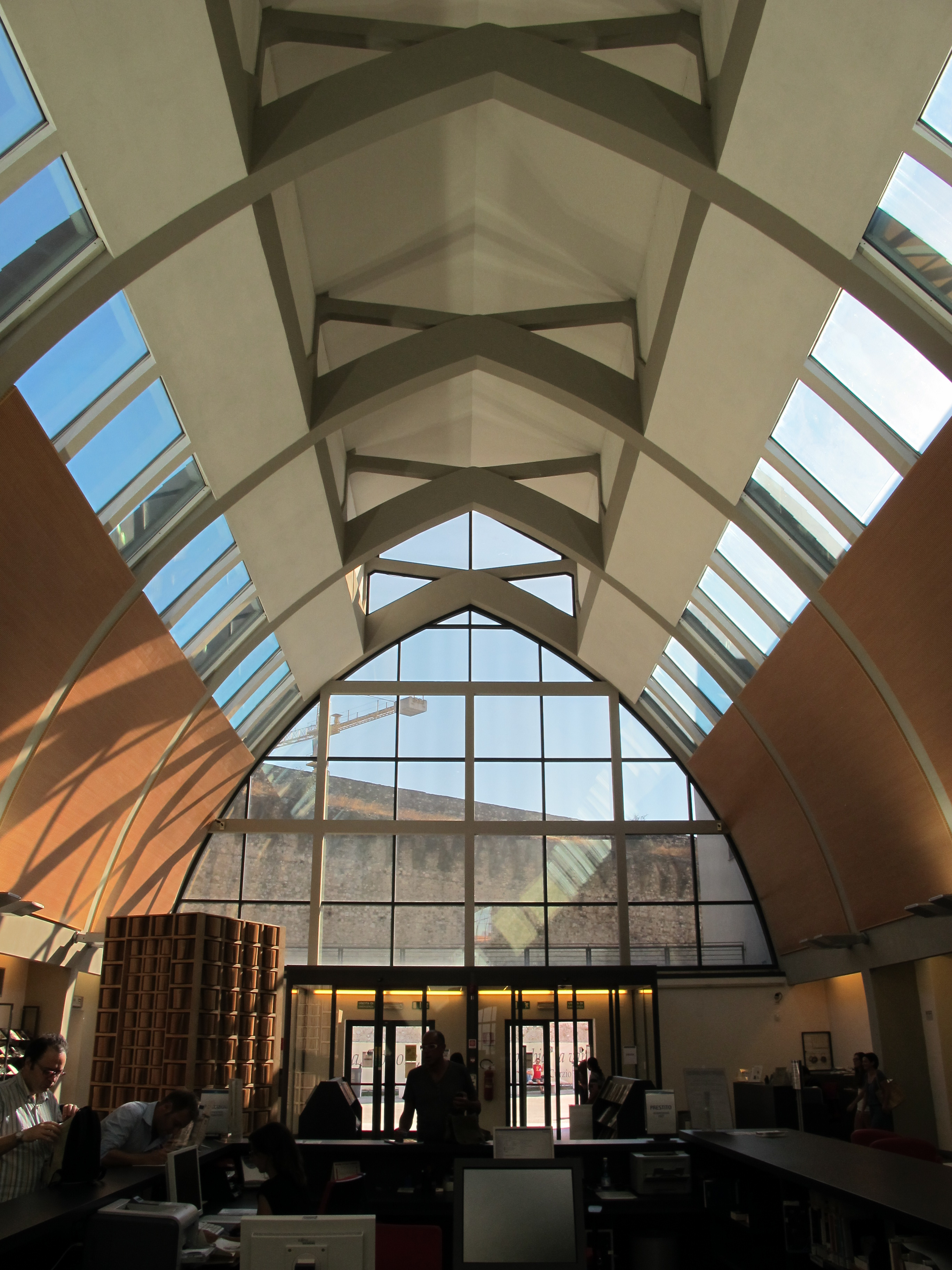 Biblioteca Lazzerini (ex fabbrica Campolmi) This is a photo of a monument which is part of cultural heritage of Italy.